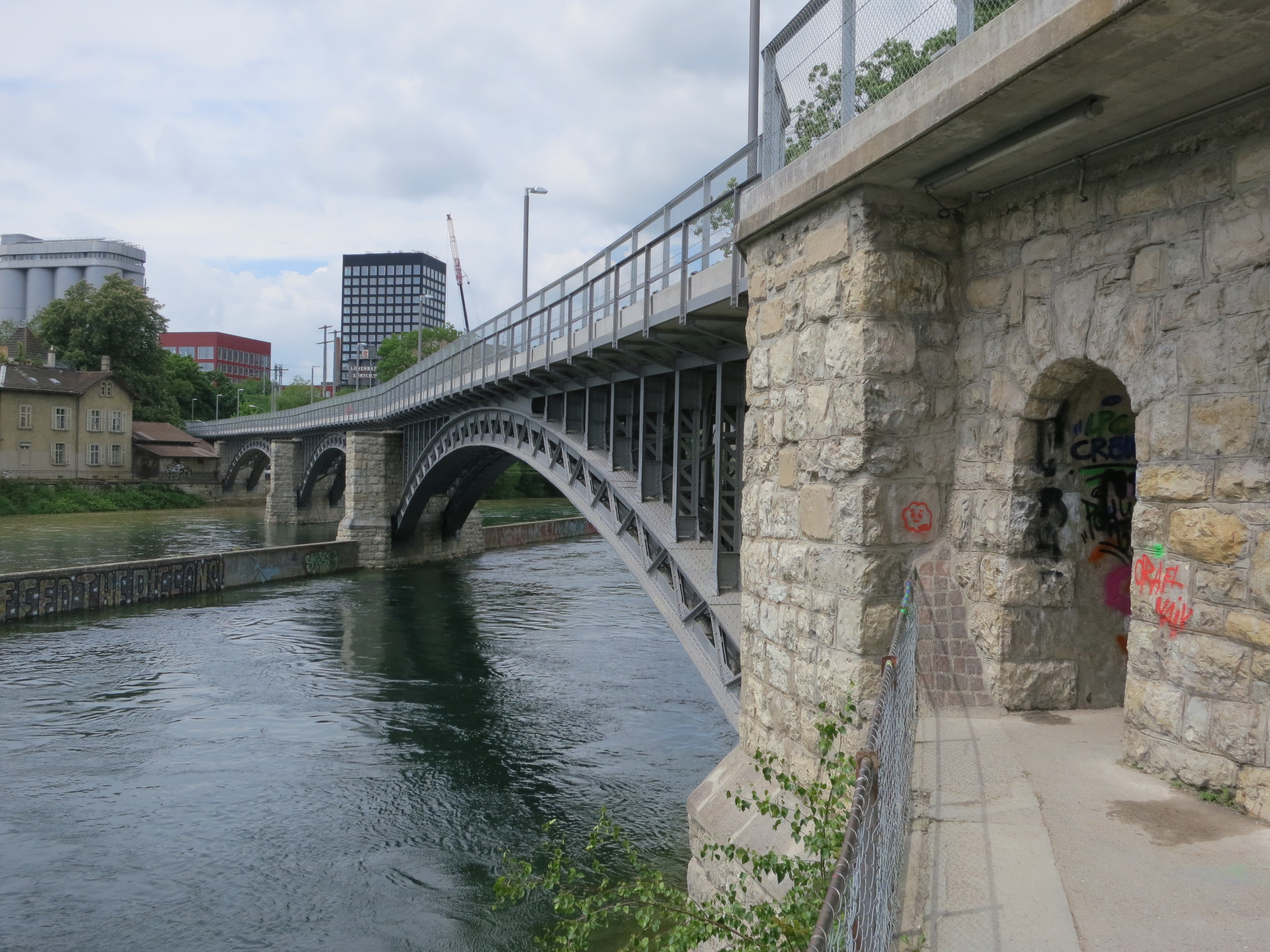 Limmatstellung, Zürich-Wipkingen, Schweiz: A 4856 Permanente Waffenstellung, Lettenviadukt. Bunker am Brückenpfeiler "limmataufwärts", hier nicht sichtbar, da von Holzschuppen verdeckt